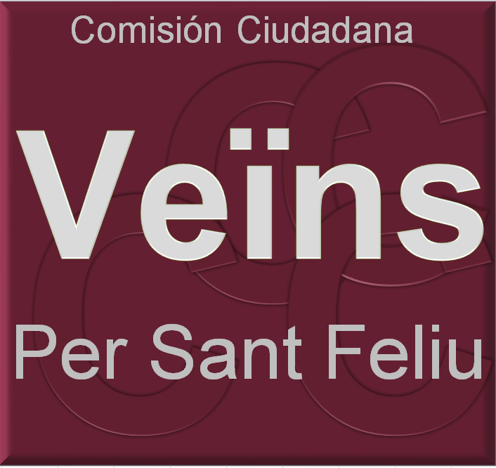 Veïns per Sant Feliu - Logo